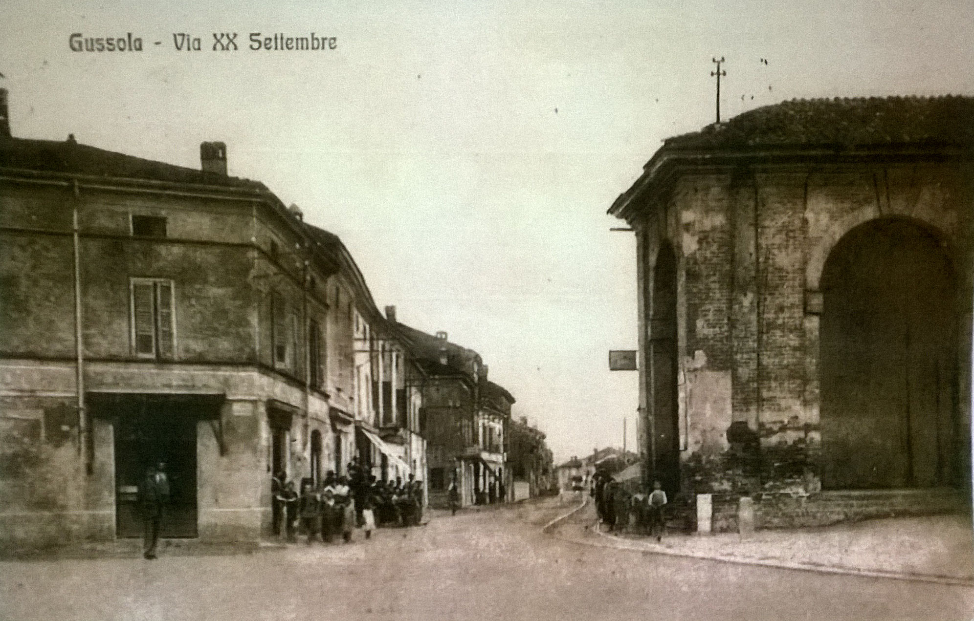 Cartolina storica - via Roma e Logge